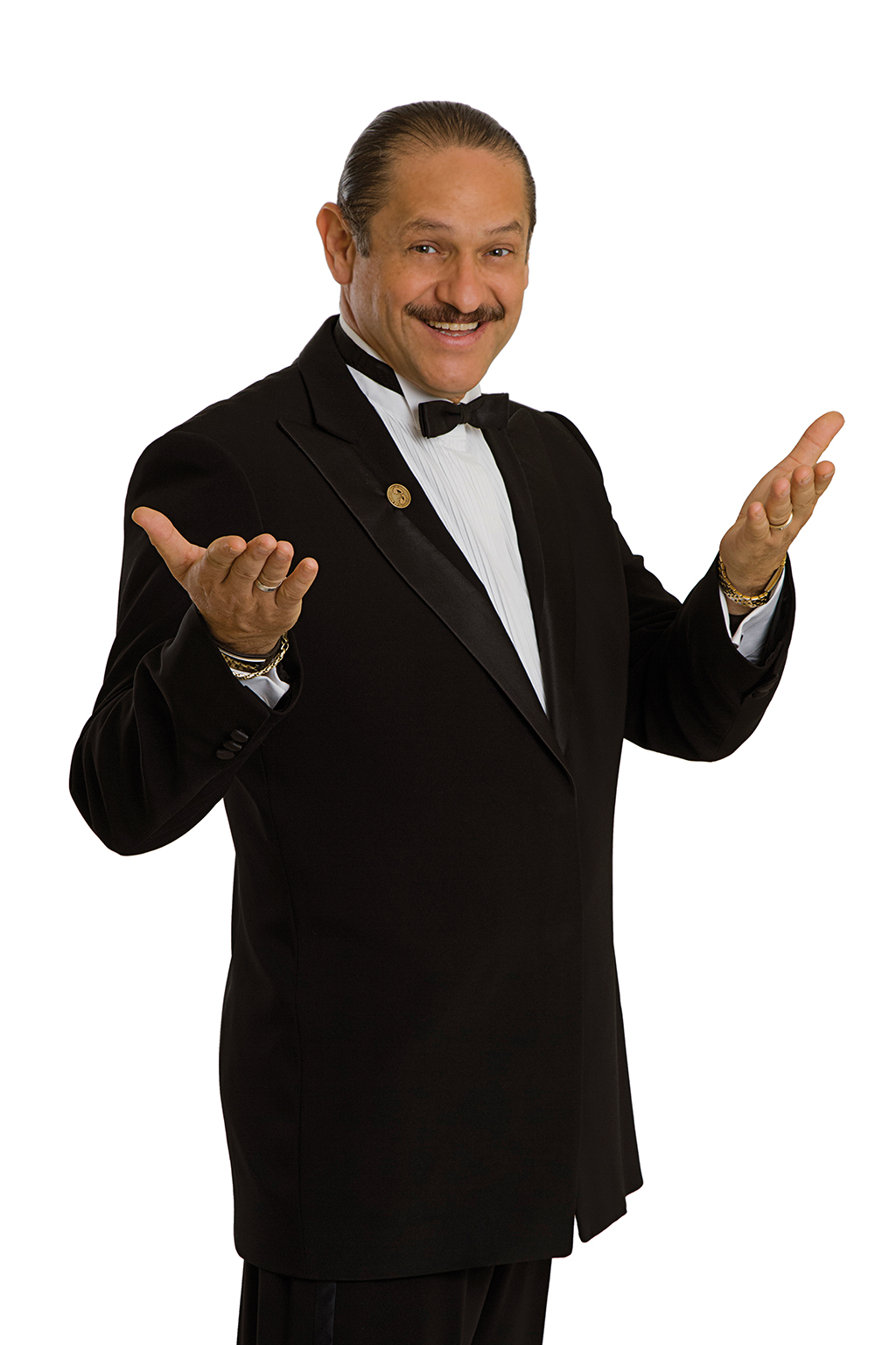 Teo González "El Comediante de la Cola de Caballo